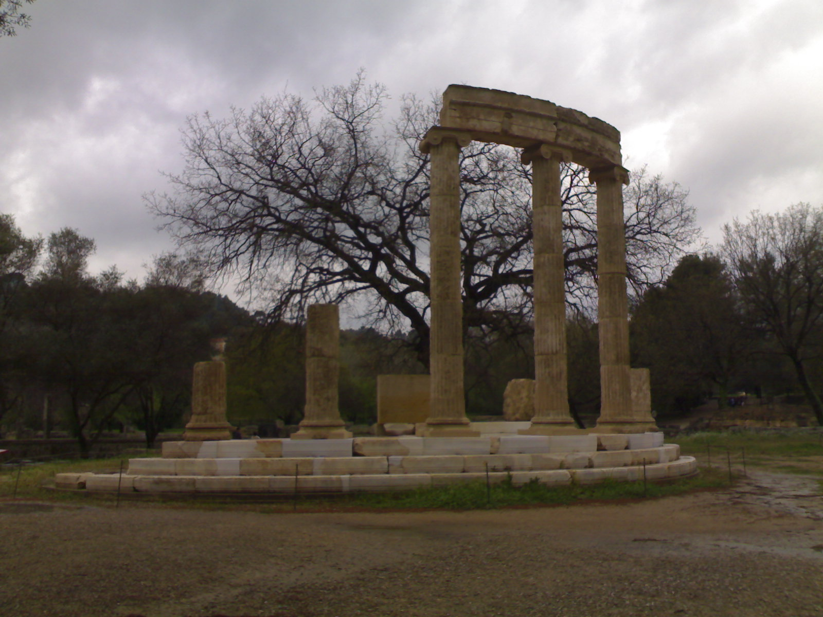 Temple in Olimpia